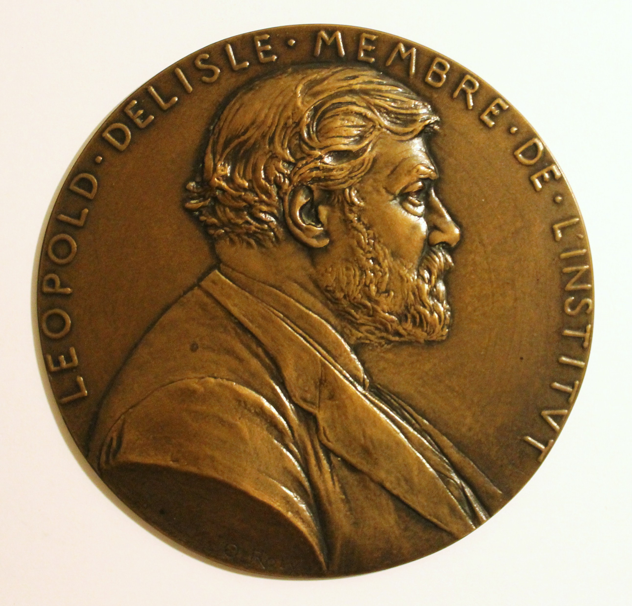 Médaille fondue (100 mm) de Léopold Delisle, membre de l'Institut réalisée en 1889. (Collection personnelle)